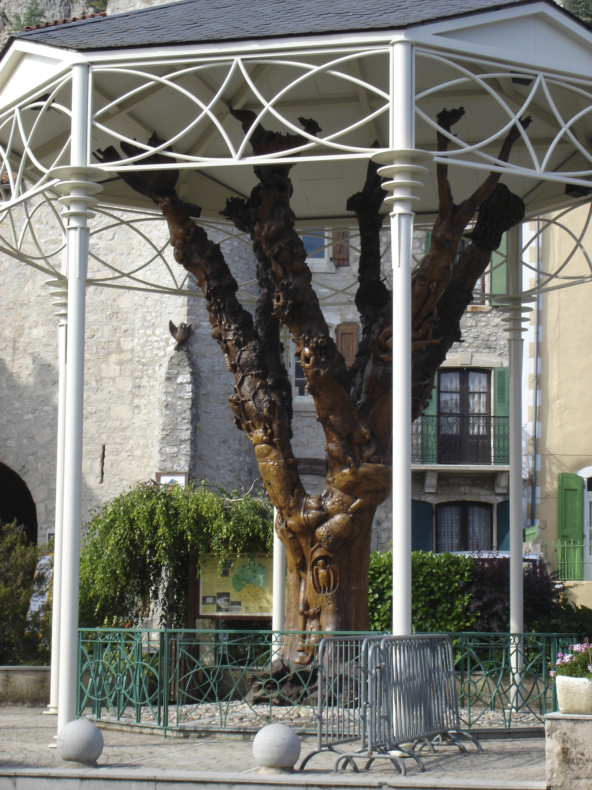 Le Caylar(34) - Le Caylar